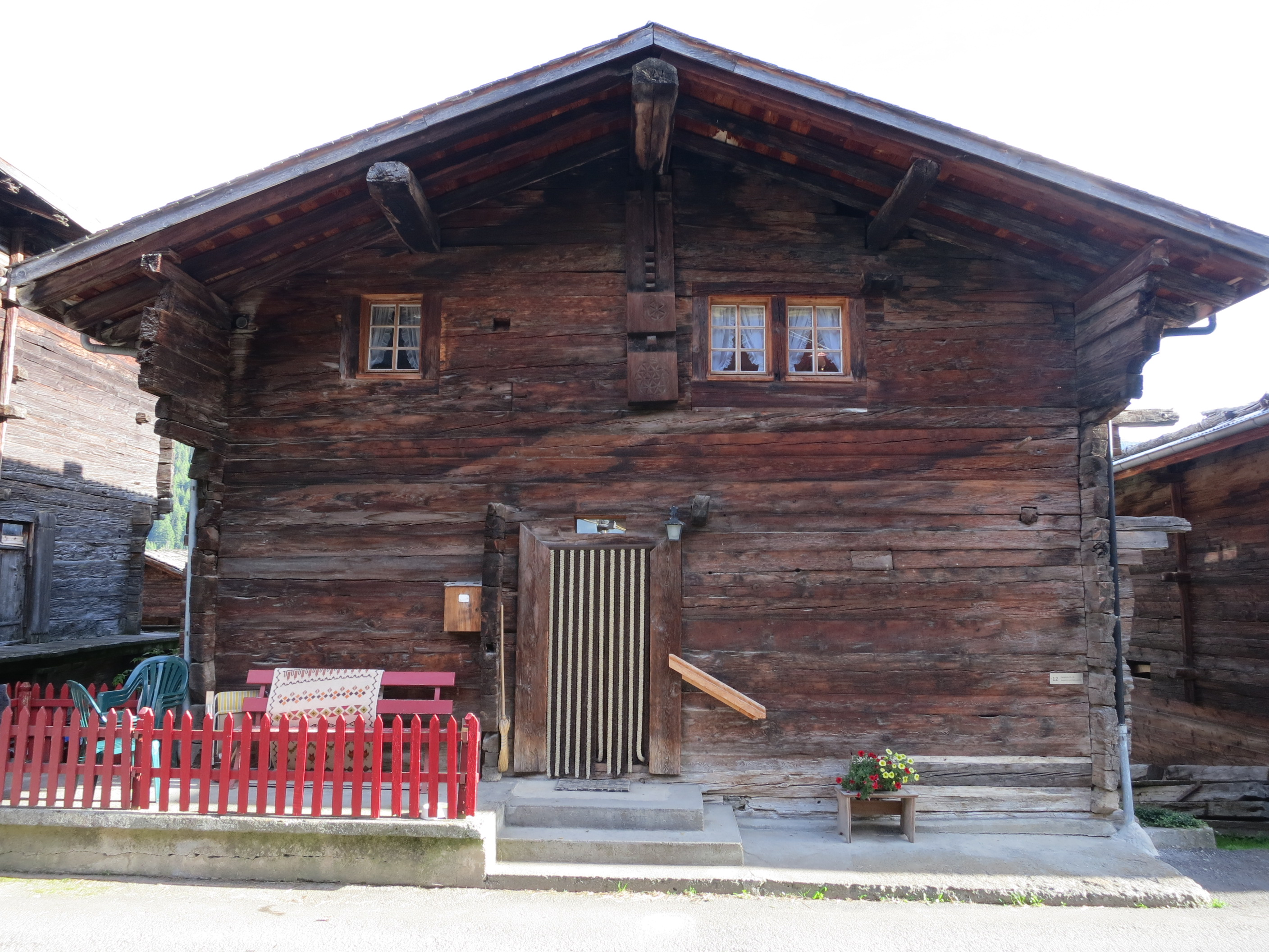 Wohnhaus, Reckingen VS, Schweiz